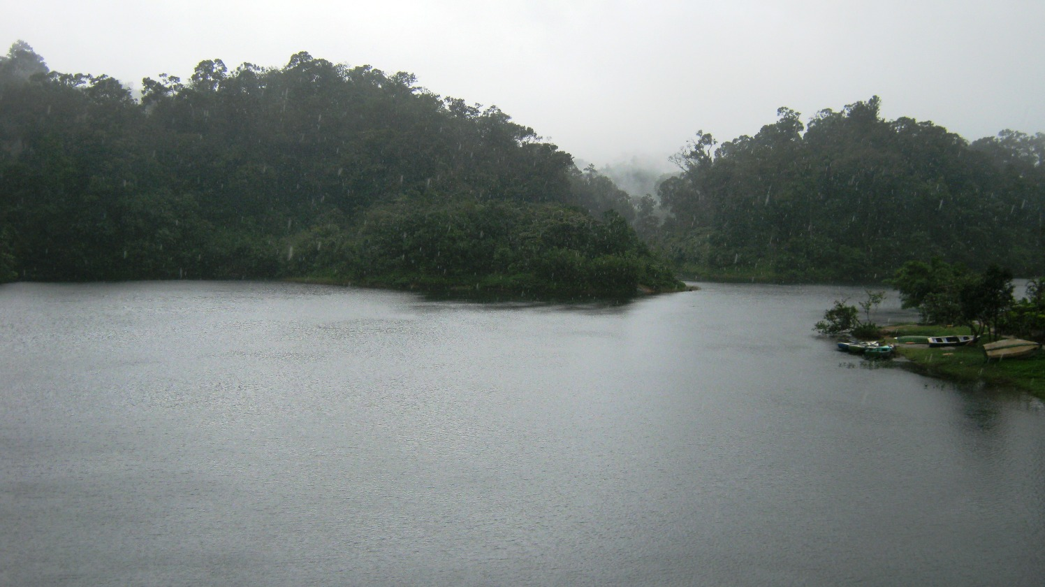 Misty Gavi Dam